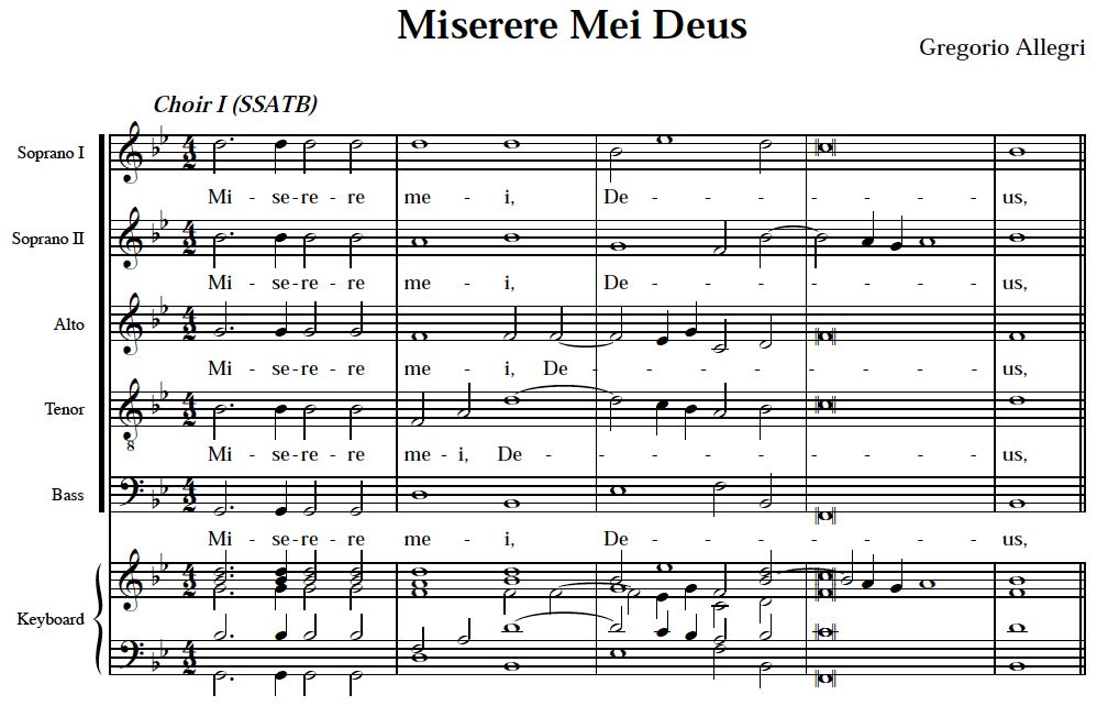 extrait du Miserere (Allegri) Gregorio Allegri ?